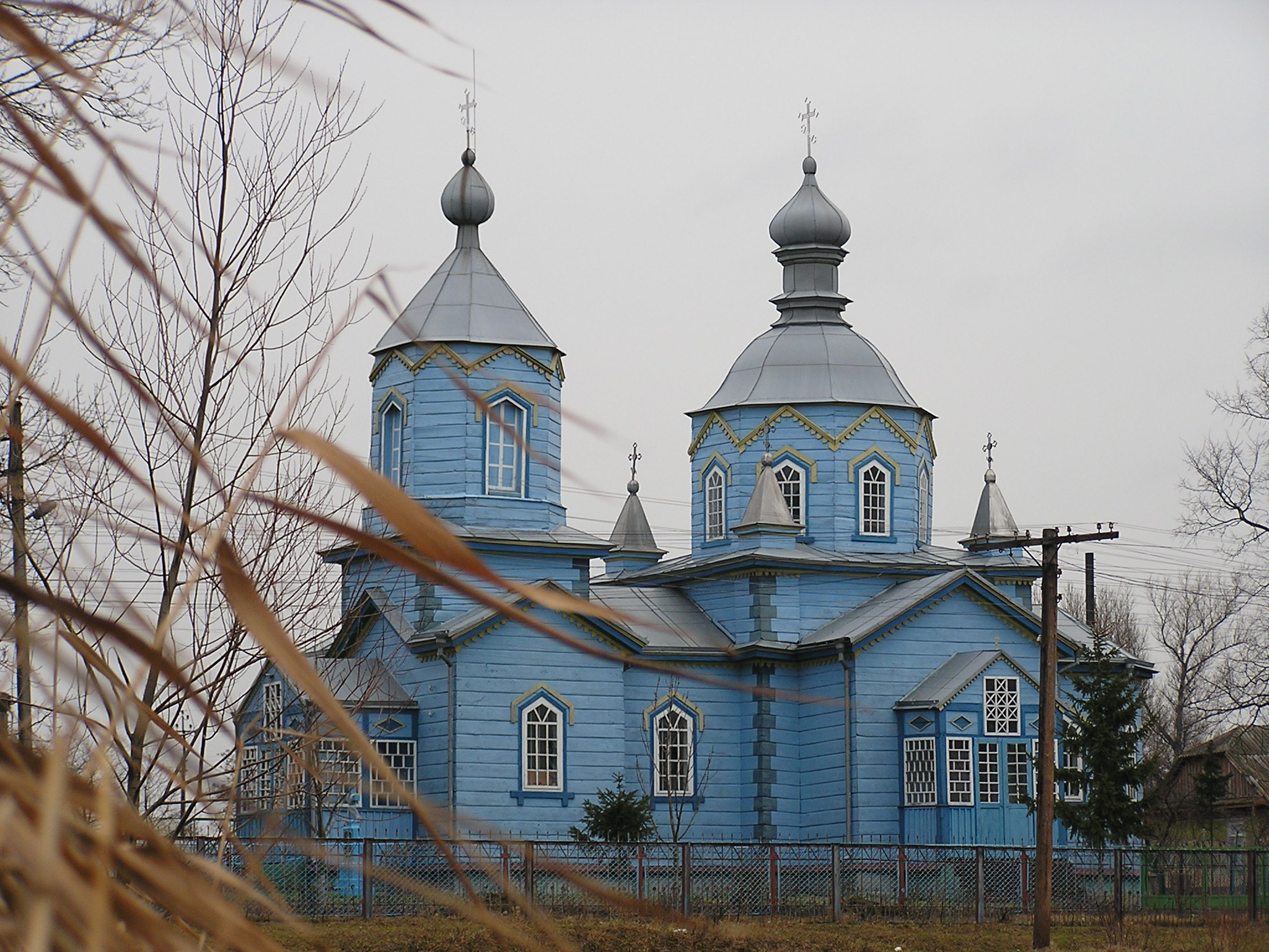 Церква с.Овлочин. Відбудована вже за часів незалежності. Church in village Ovlochin, Turijsky Raion, Volyn Oblast.